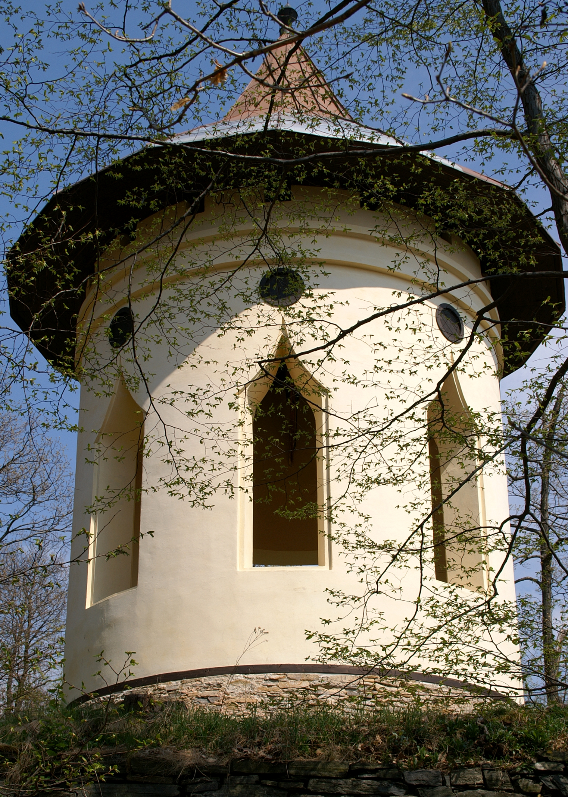 Gloriet - lovecký pavilon nad řekou Oslavou poblíž osady Vlčí kopec na Třebíčsku